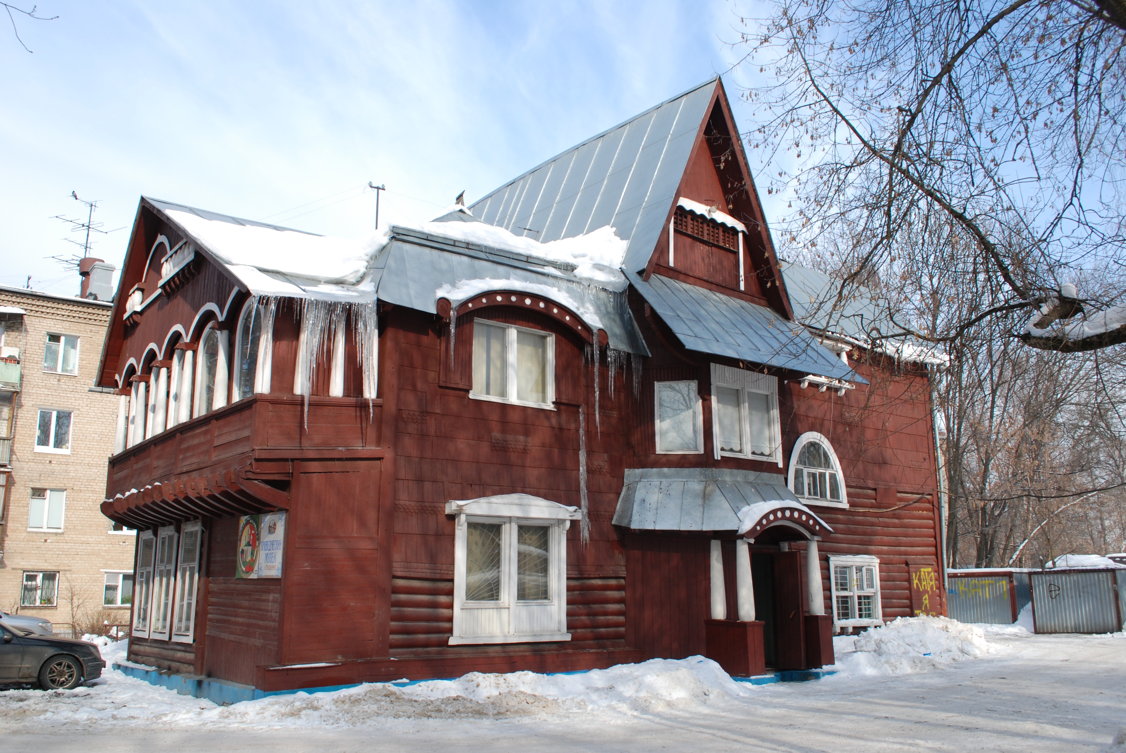 Здание краеведческого музея (Москва и Московская область, Пушкино, Московский пр., 35а)